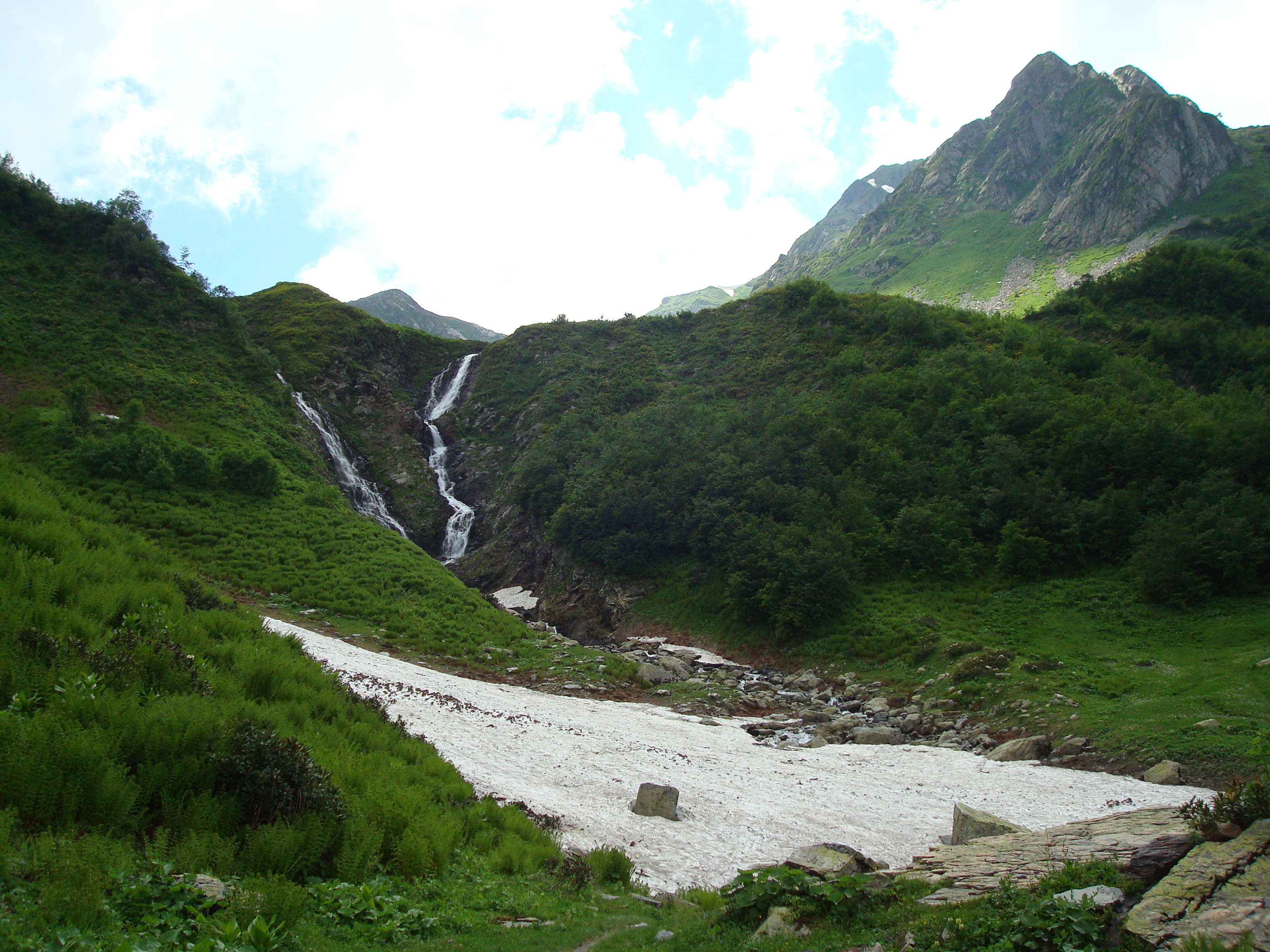 Водопад в верховьях реки Ачипсе. Большие Сочи (Сочи), Сочи This image is related to the protected area of Russia number 2300355